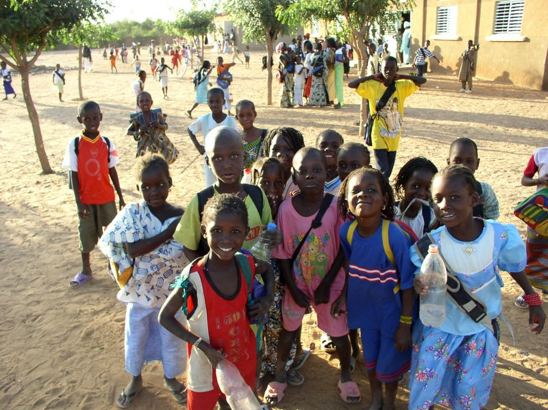 Children attending school in Kanel, Senegal.